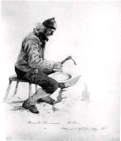 Gammel mann i folkedrakt arbeider med tverrøks (teksle). Akvarell av J. Frich, juni 1849. Numedal - Nore - Buskerud. Arnold Vammen 75 år.